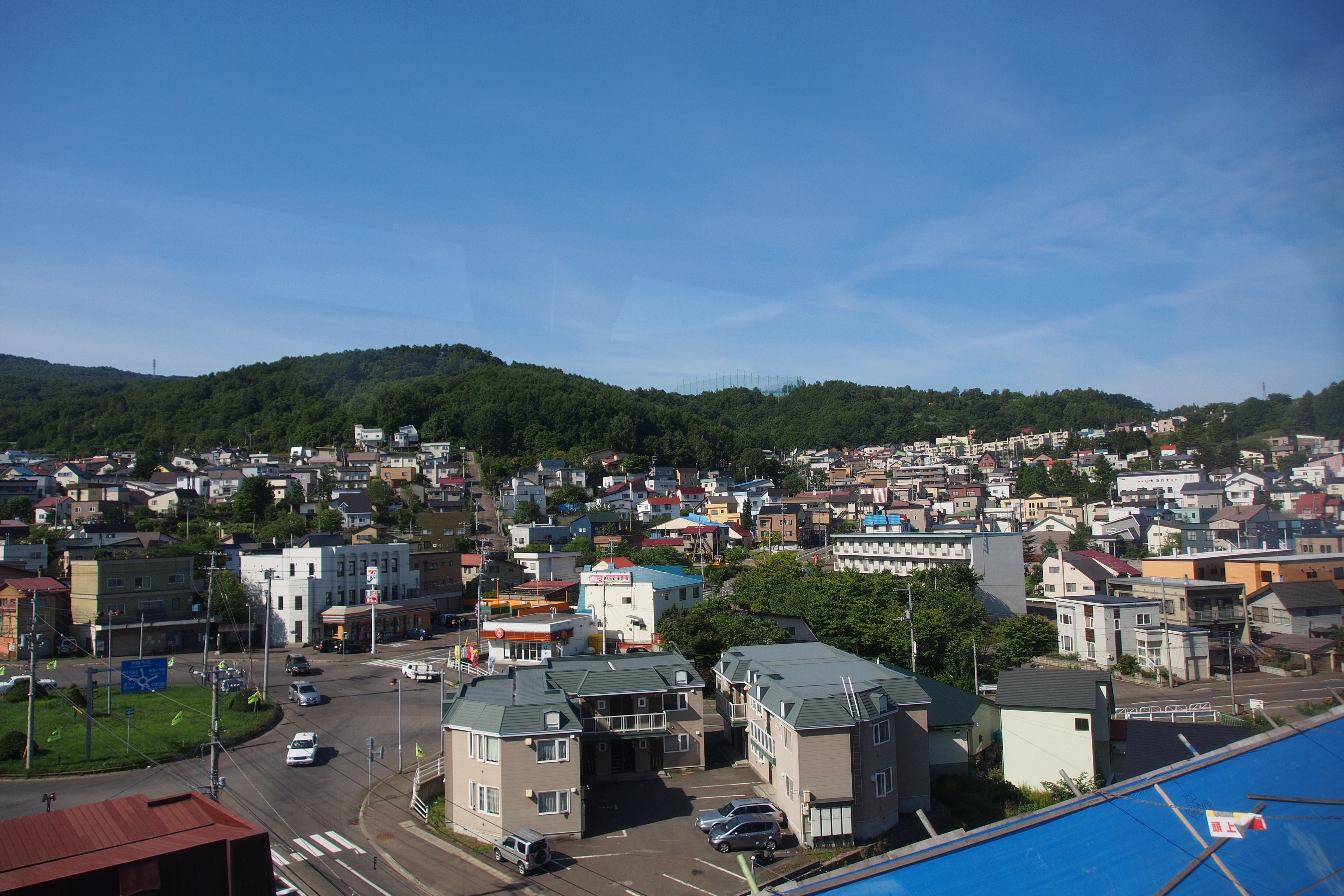 ロータリー交差点周辺（小樽市桜）